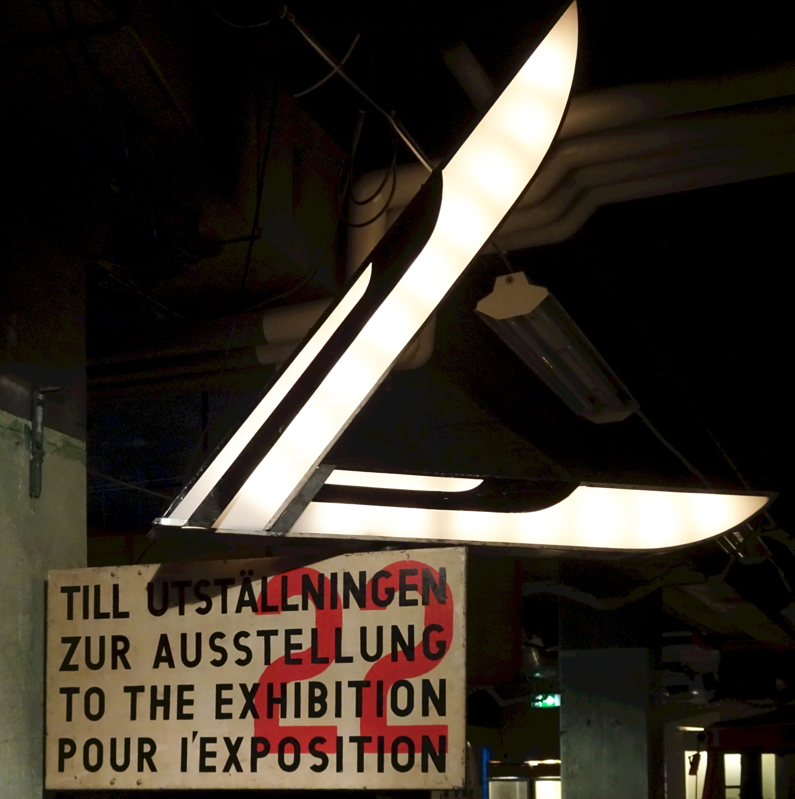 Sigurd Lewerentz skylt till Stockholmsutställningen 1930, finns på Spårvägsmuseet,.